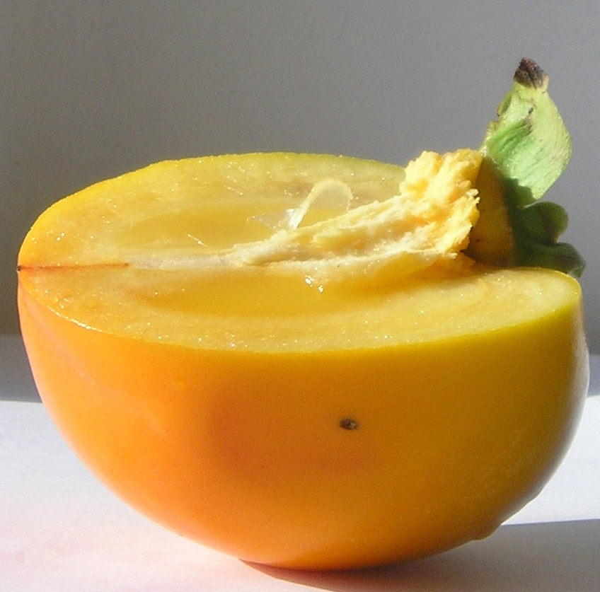 aufgeschnittene Kakifrucht